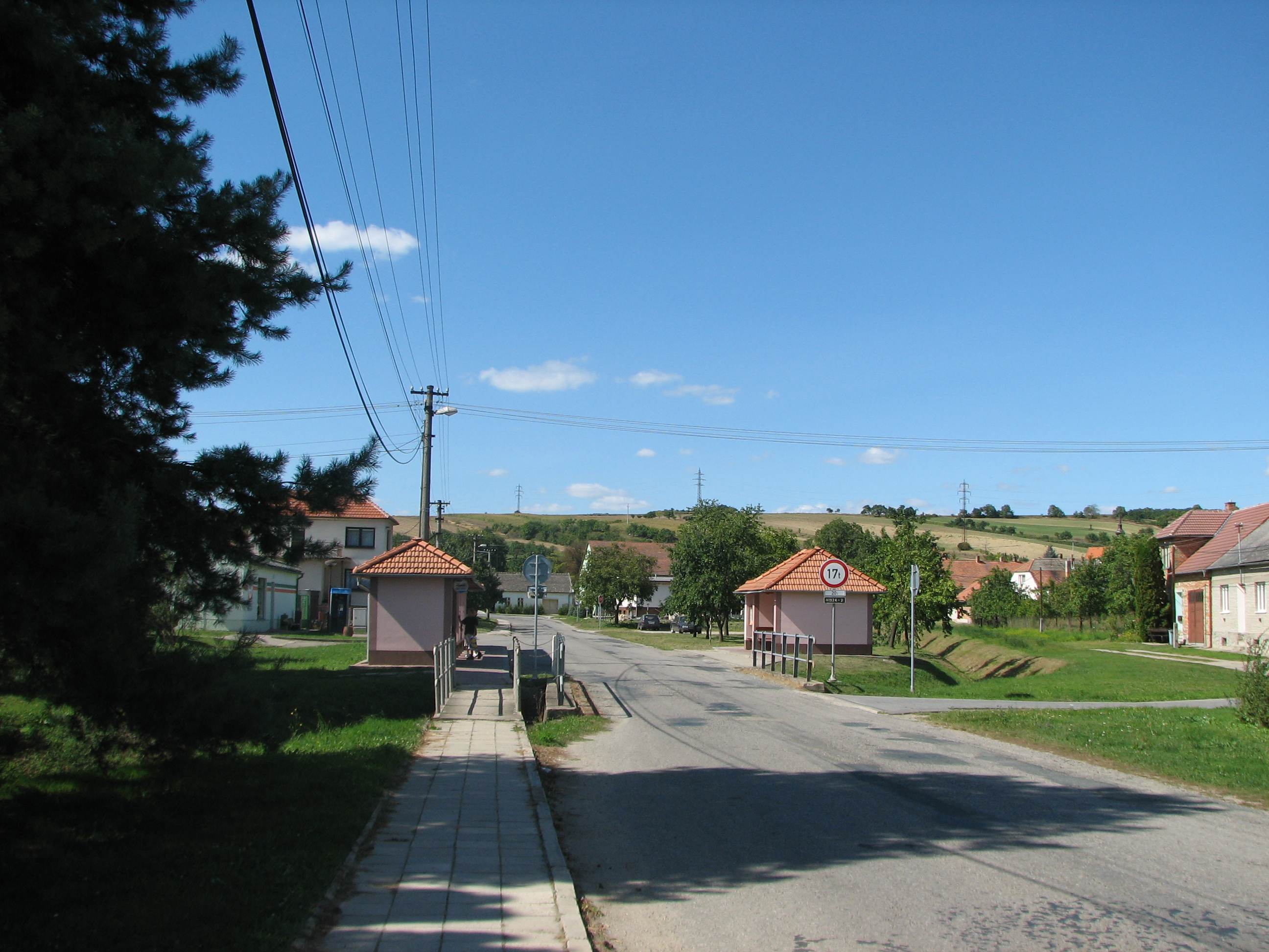 Česky: Stavěšice - náves